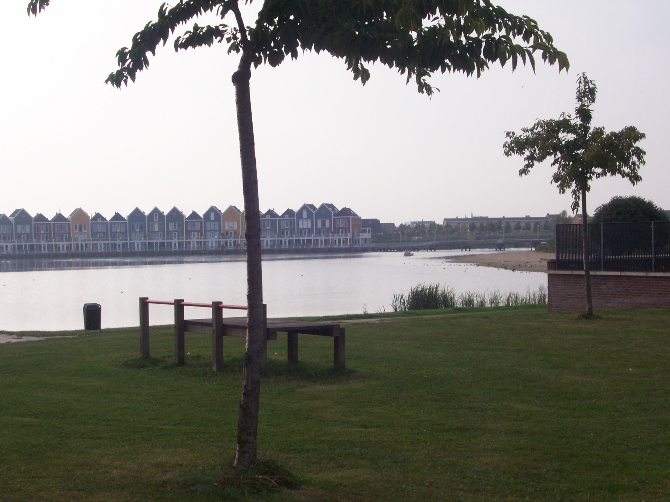 Bord d'un lac à Houten ; photographie prise depuis une piste cyclable.